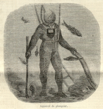 Appareil de plongeur